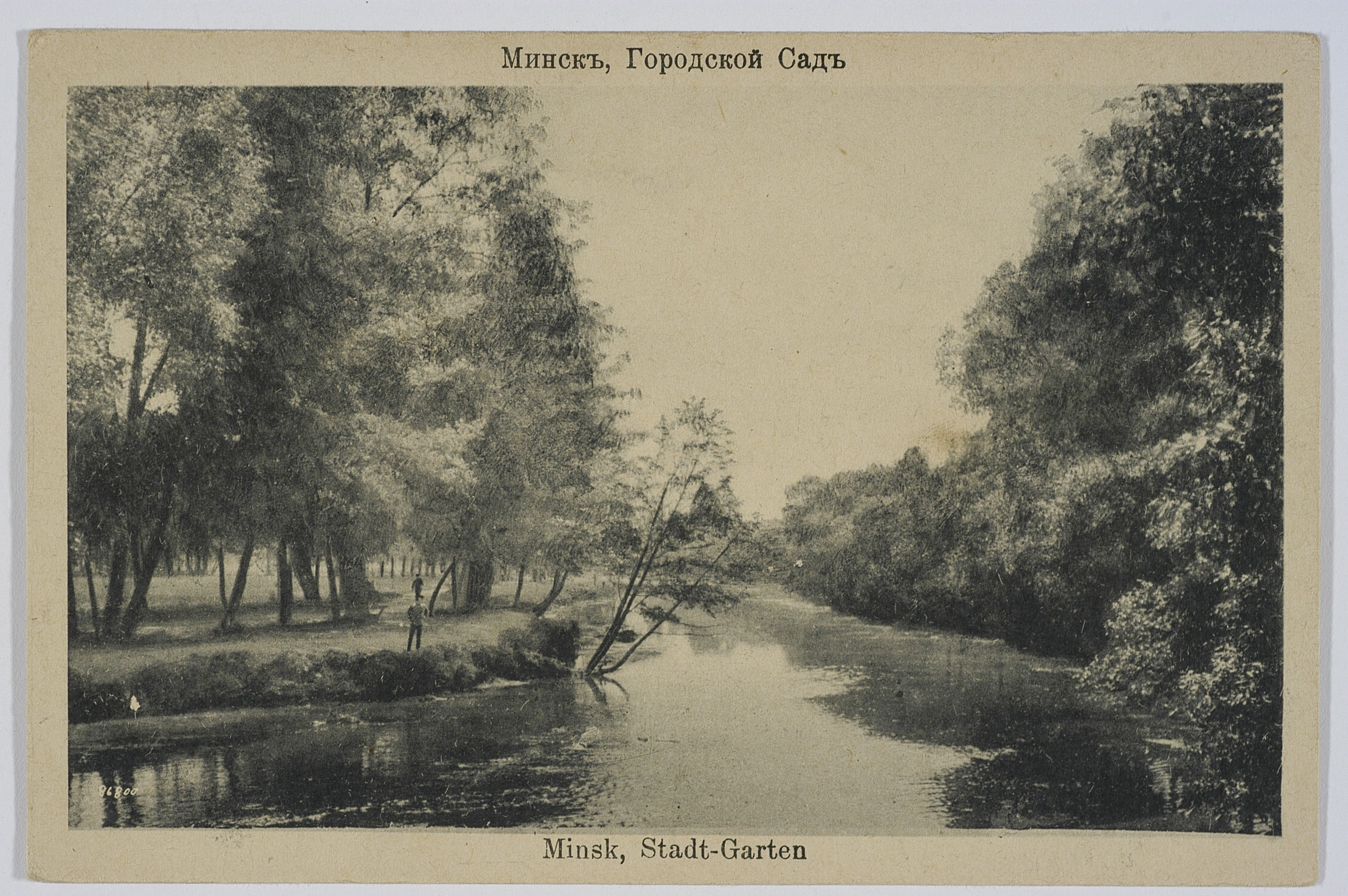 Беларуская (тарашкевіца): Менск (Miensk), рака Сьвіслач (Śvisłač). Мескі сад